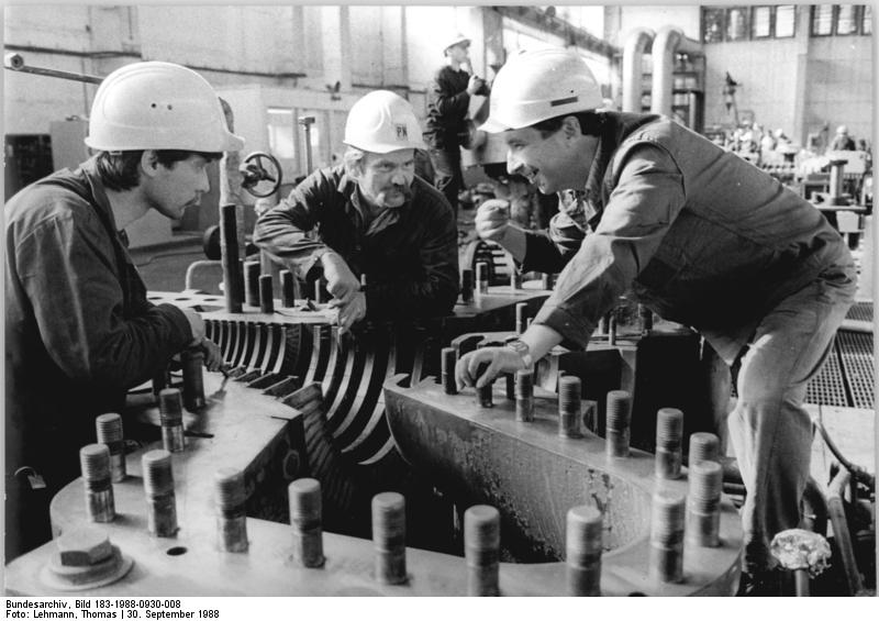 Piesteritz, ungarische Gastarbeiter ADN-ZB Lehmann 30.9.88 Bez. Halle: Wettbewerb- Am 19. September begann im VEB Kombinat Agrochemie Piesteritz eine Generalreparatur. 42 Tage stehen die Spezialisten aus der DDR, die von Kollegen aus der UdSSR, der VRB, der UVR und der CSSR unterstützt werden, dafür zur Verfügung. Reibungslos ist die Zusammenarbeit mit 10 ungarischen Spezialisten des Betriebes Peti-Nitrogenmüvek, die mit eingesetzt sind bei Instandhaltungsarbeiten im Maschinenhaus der Anlage. Hier weist Technologe Wolfgang Straube (r.) Sandor Bollok und Karoly Szöllon (vlnr) in die Wartungsarbeiten an einem Turbinengehäuseteil ein. siehe auch 1988-0930-7N